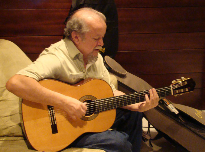 Foto Paulo Lima